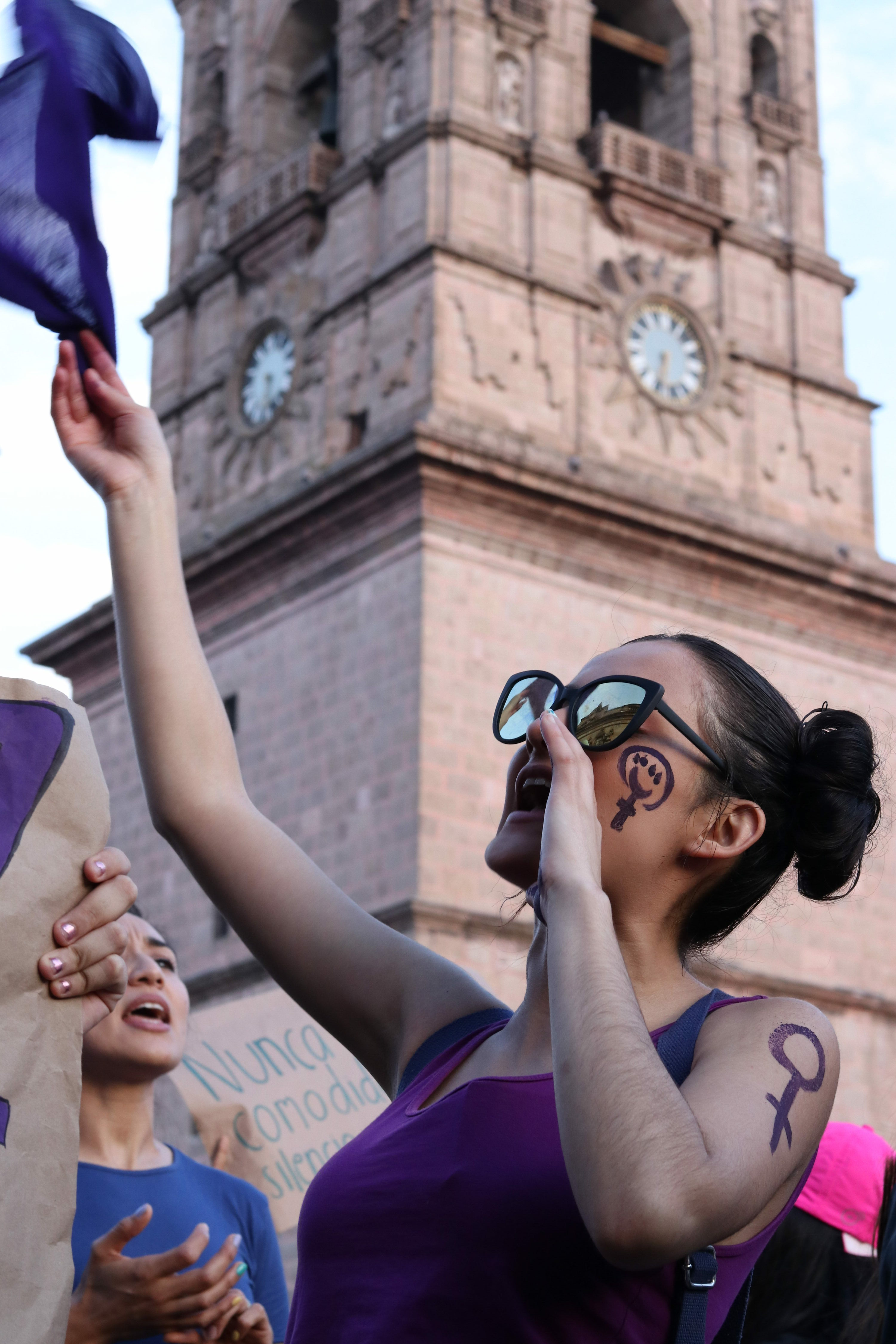 Marcha feminista en Morelia, Michoacán.